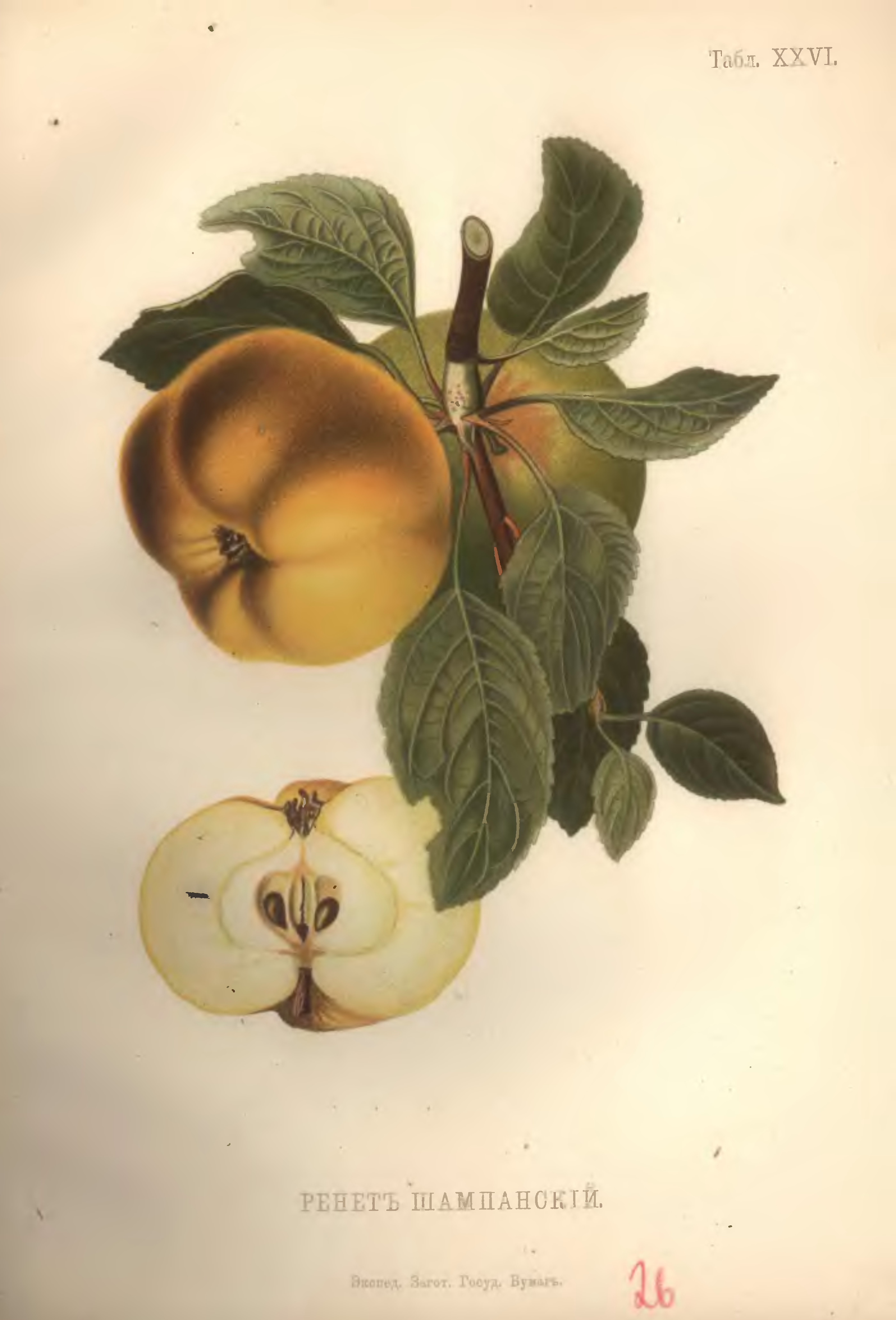 Ренет шампанский